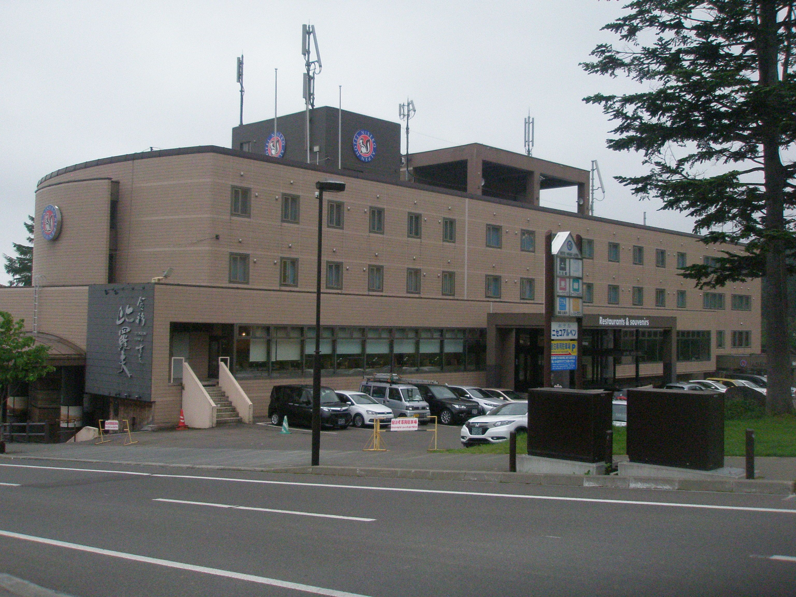 ホテルニセコアルペン全景（2018年7月撮影）